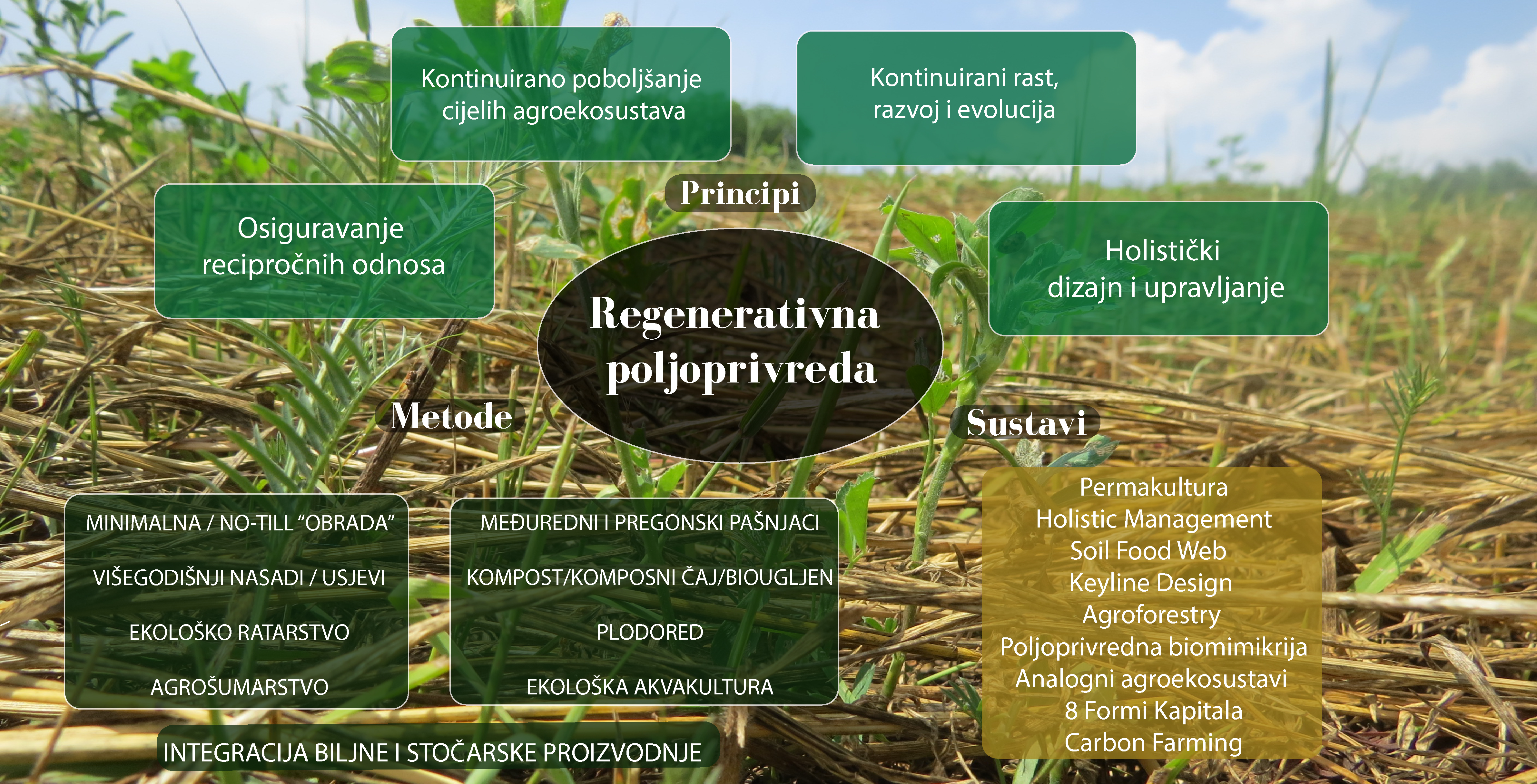 Infografika